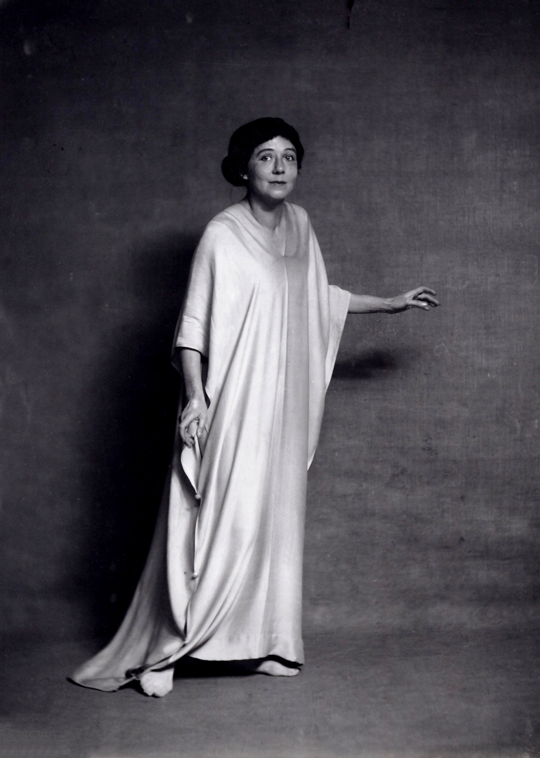 Beschrijving Jacqueline Royaards Sandberg (1876-1976) Toneelspeelster, als Indra's dochter in Strindberg's 'Droomspel'. Documenttype foto Vervaardiger Merkelbach, Atelier J. Collectie Collectie Atelier J. Merkelbach Inventarissen Afbeeldingsbestand B00000002378 Generated with Dememorixer